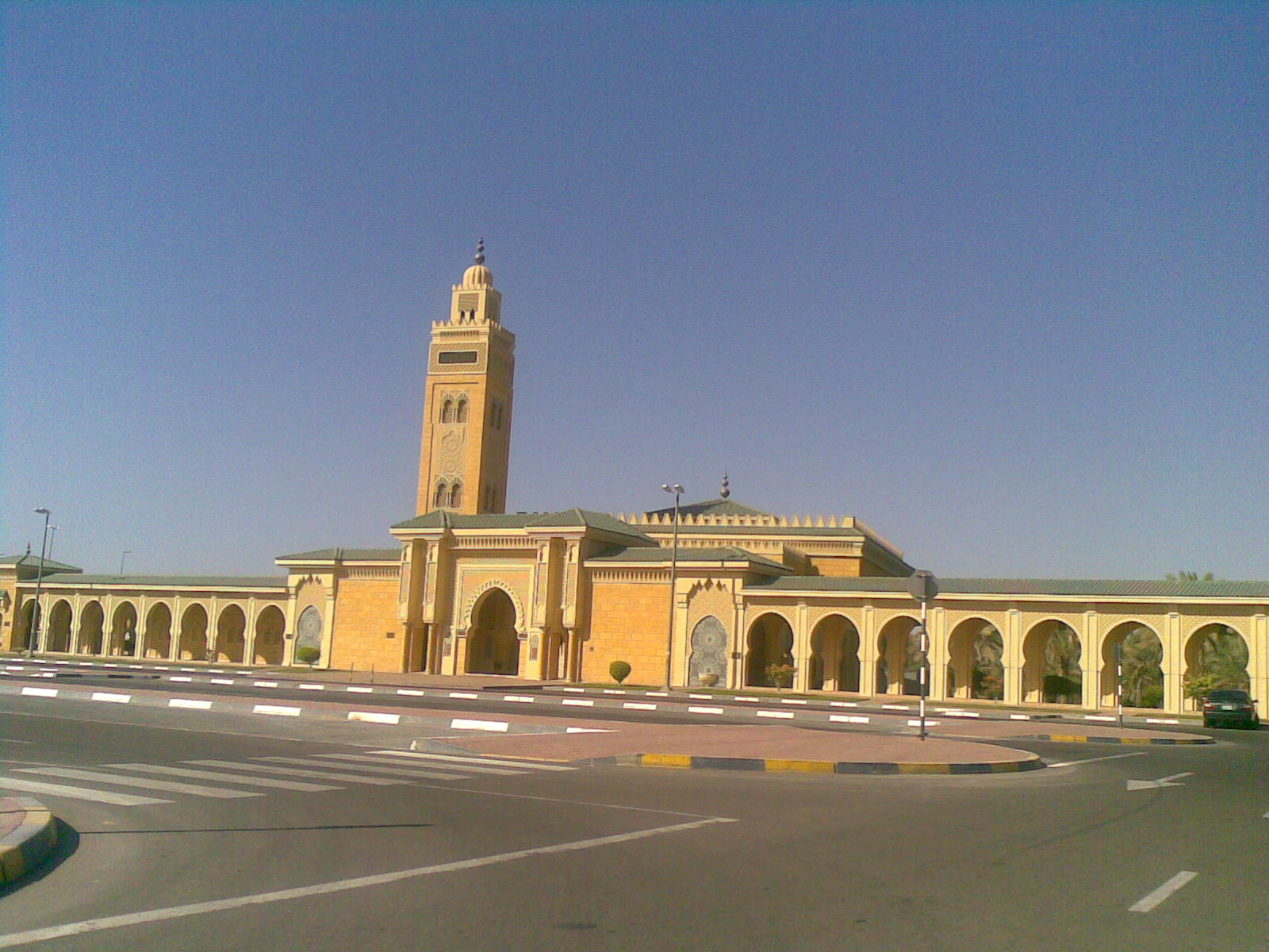 Bin Hamoudah Masjed - Al Jimi By Eng. Fadi Fayyadh Al Toubeh